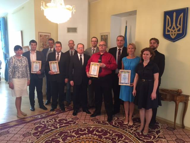 MTÜ Vaba Ukraina liikmed Ukraina saatkonnas.